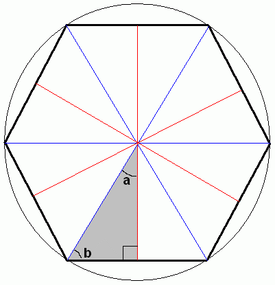 Fundamenta triangulo de seslatero